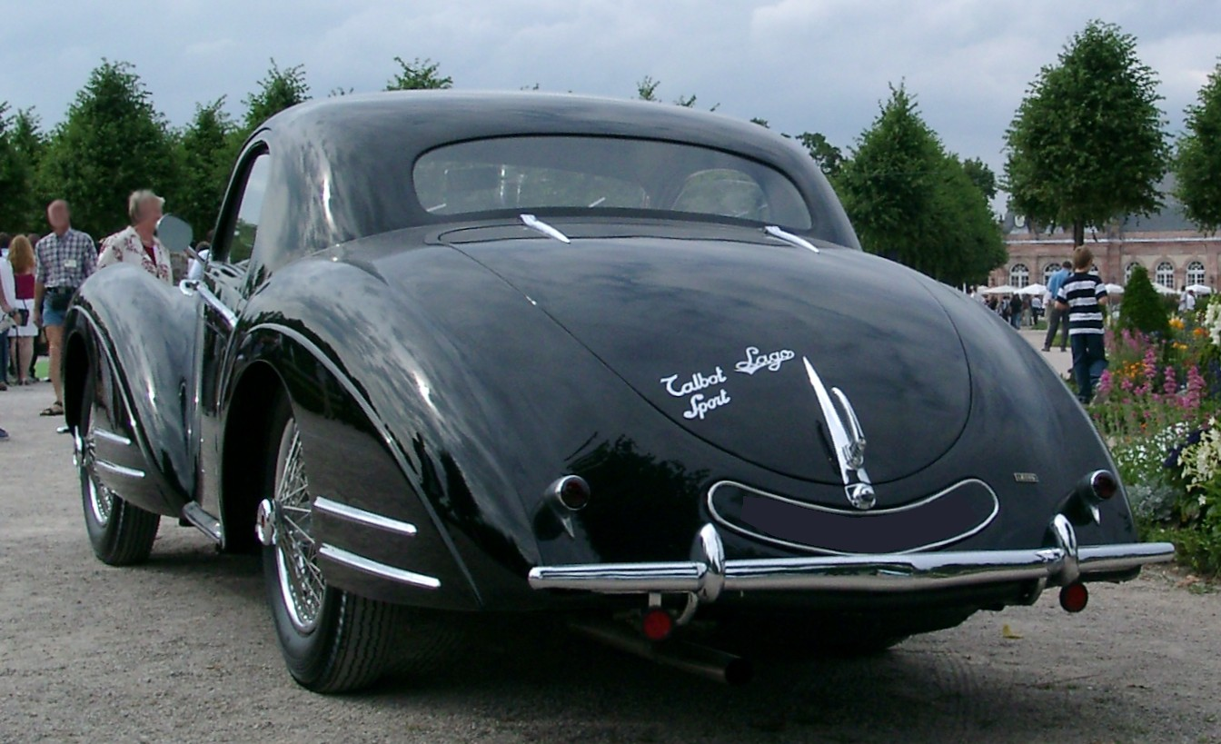 Talbot Lago Sport. Fotografiert anläßlich des European Concours d'Elegance 2002 in Schwetzingen